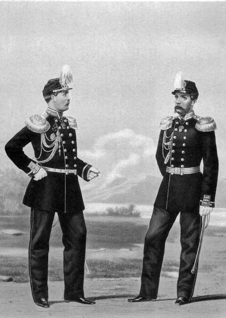 Генерал (Геодезист) и Штаб-Офицер Корпуса Военных Топографов, 14 апреля 1867. (Городские: праздничная и парадная формы).